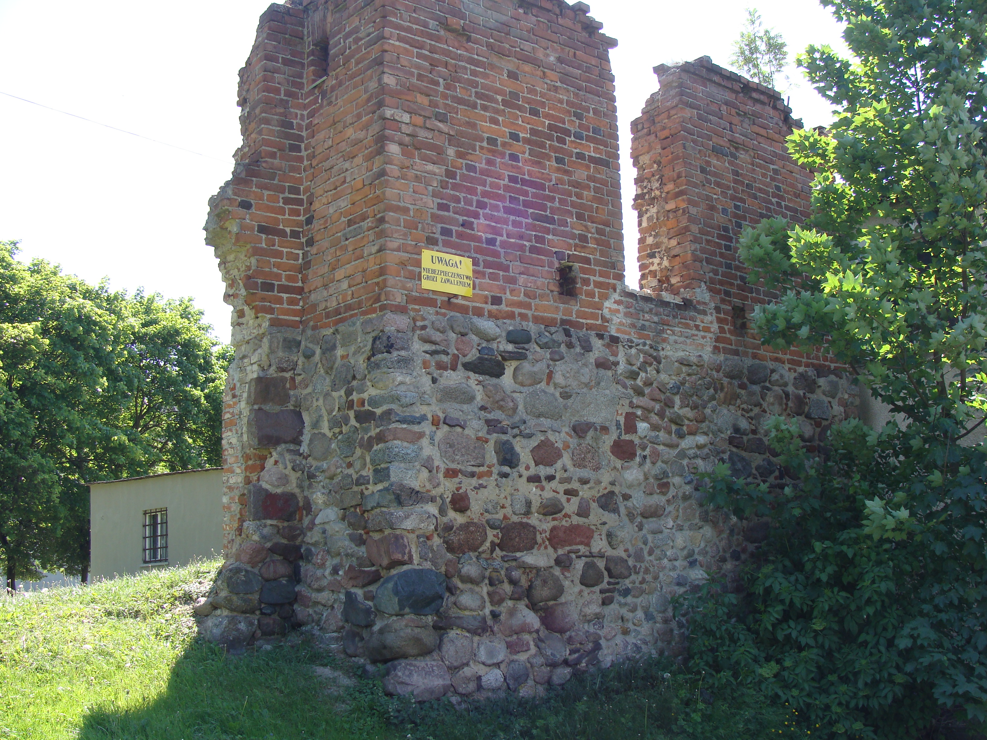 Susz - pozostałości murów obronnych